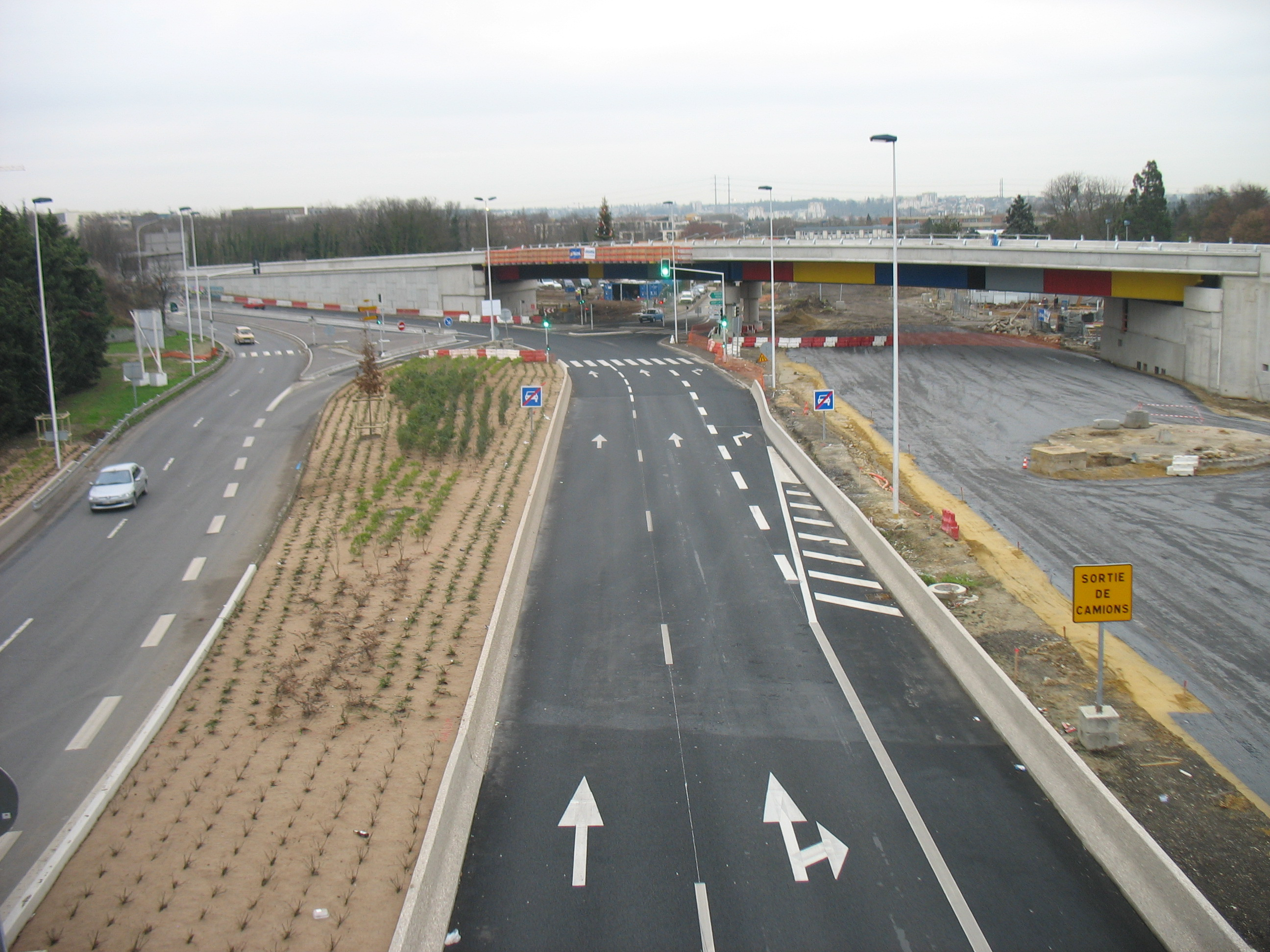 Secteur de la station Créteil Parc des Sport, le pont est celui de la futur voie TSCP Sucy-Pompadour, derrière ce pont se situe la station de métro Créteil Parc-des-Sport. A droite, la plate-forme ferroviaire, au milieu la voie automobile dans le sens Paris-Province et à gauche le sens Province-Paris